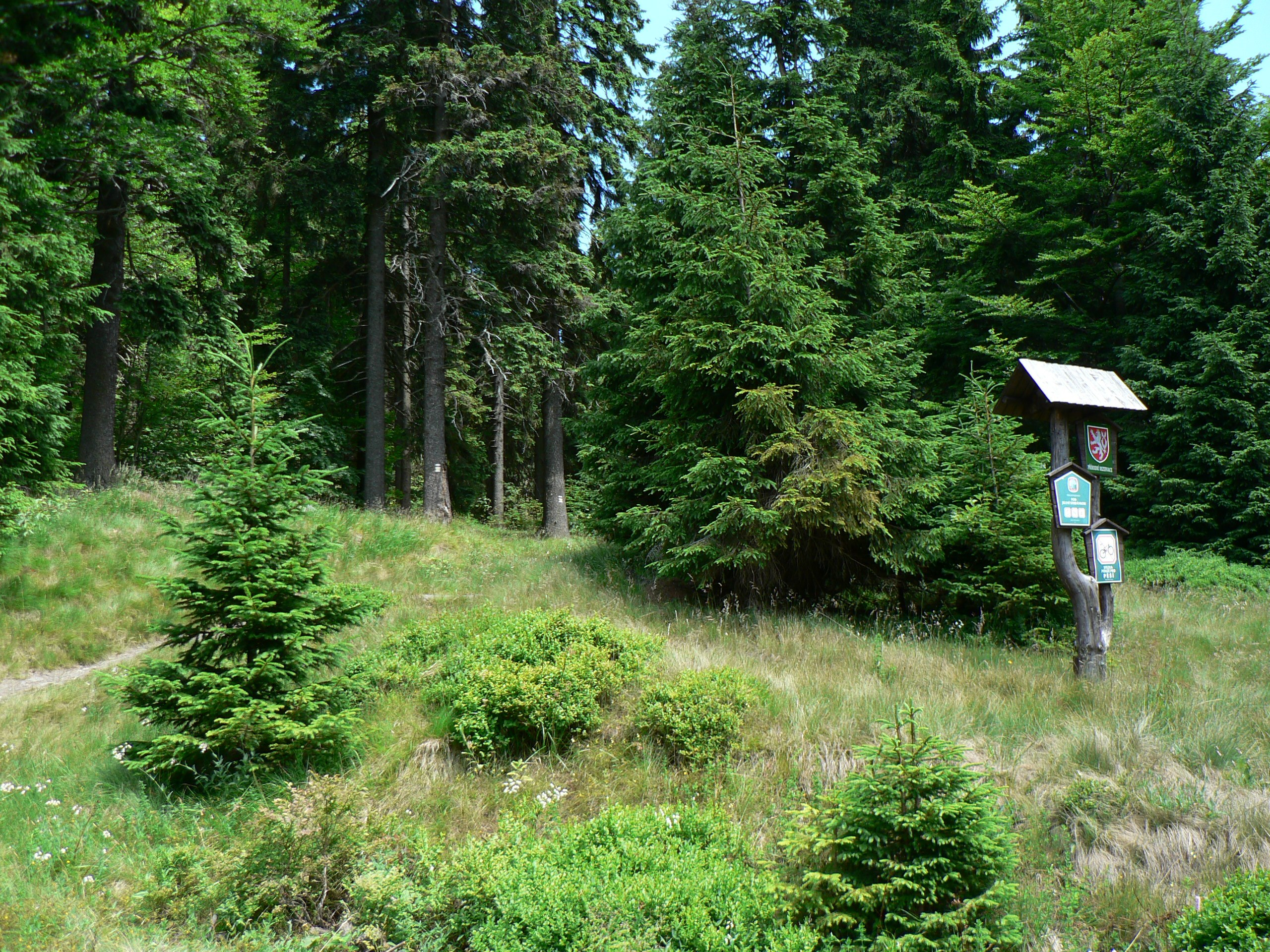 Na okraji rezervace Pod Jelení studánkou, nedaleko Alfrédky